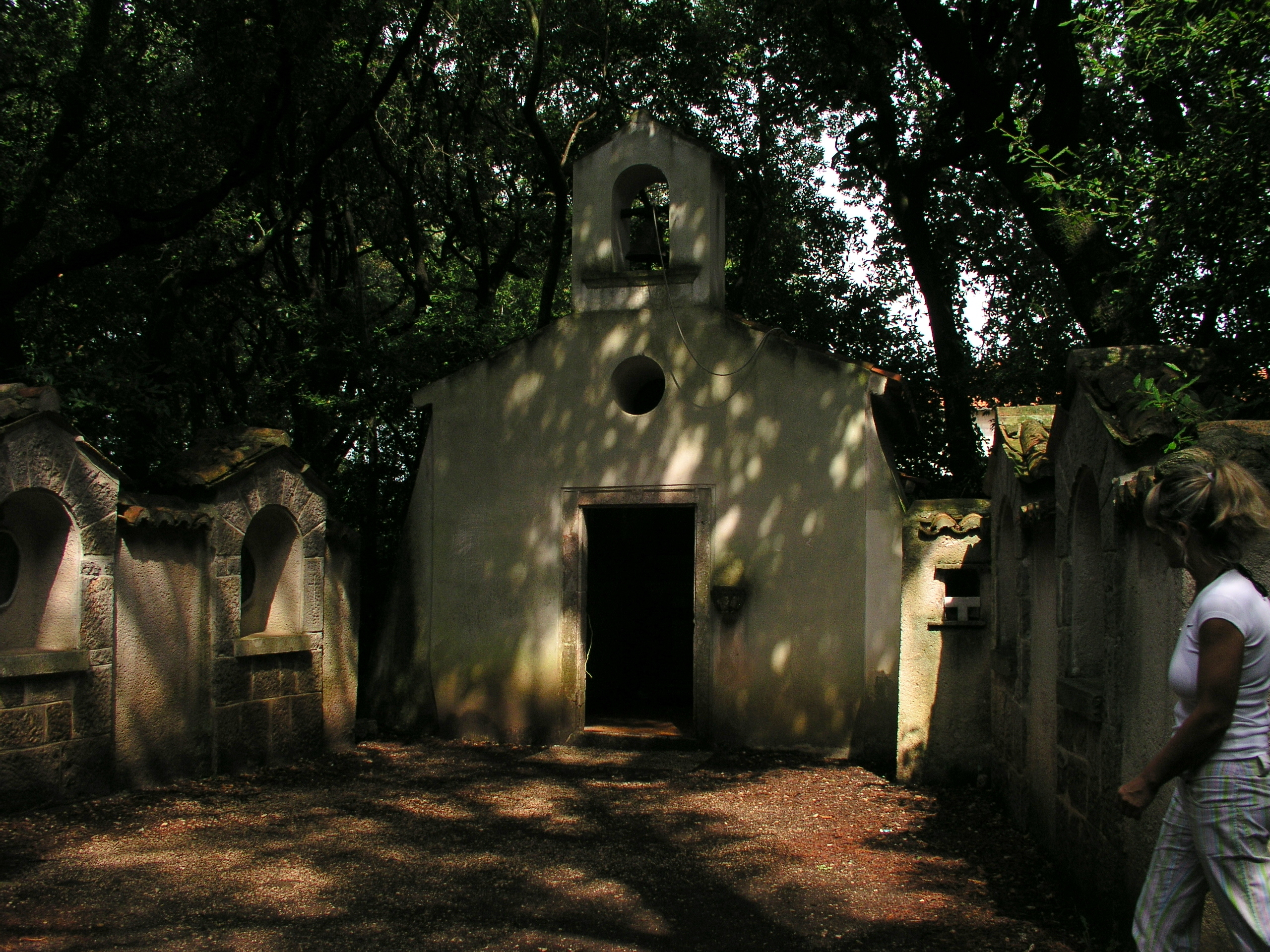 Interno del Chiostro del monastero nell'isoletta di Kosljun